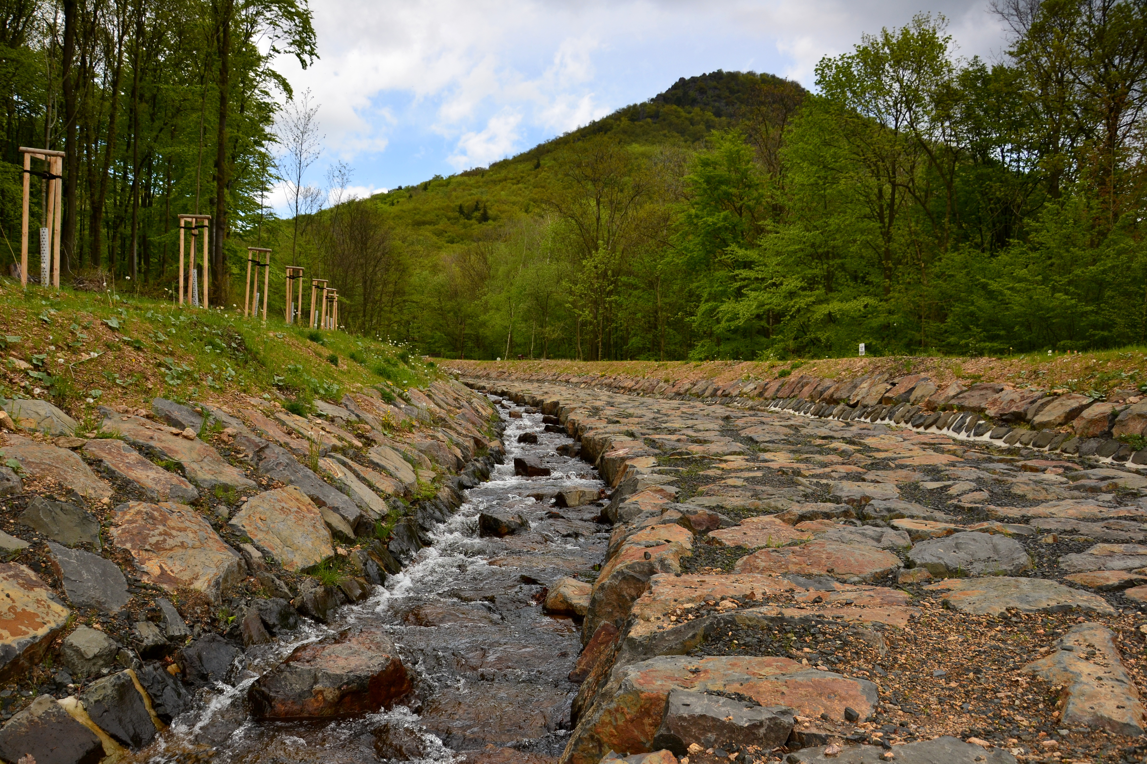 Přeložka koryta Vesnického potoka